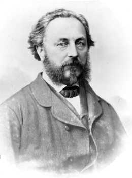 Motiv: Robert Gerwig